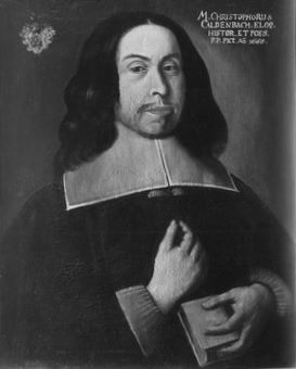 Christoph Caldenbach (1613-1698), deutscher Philologe, Historiker und Lyriker